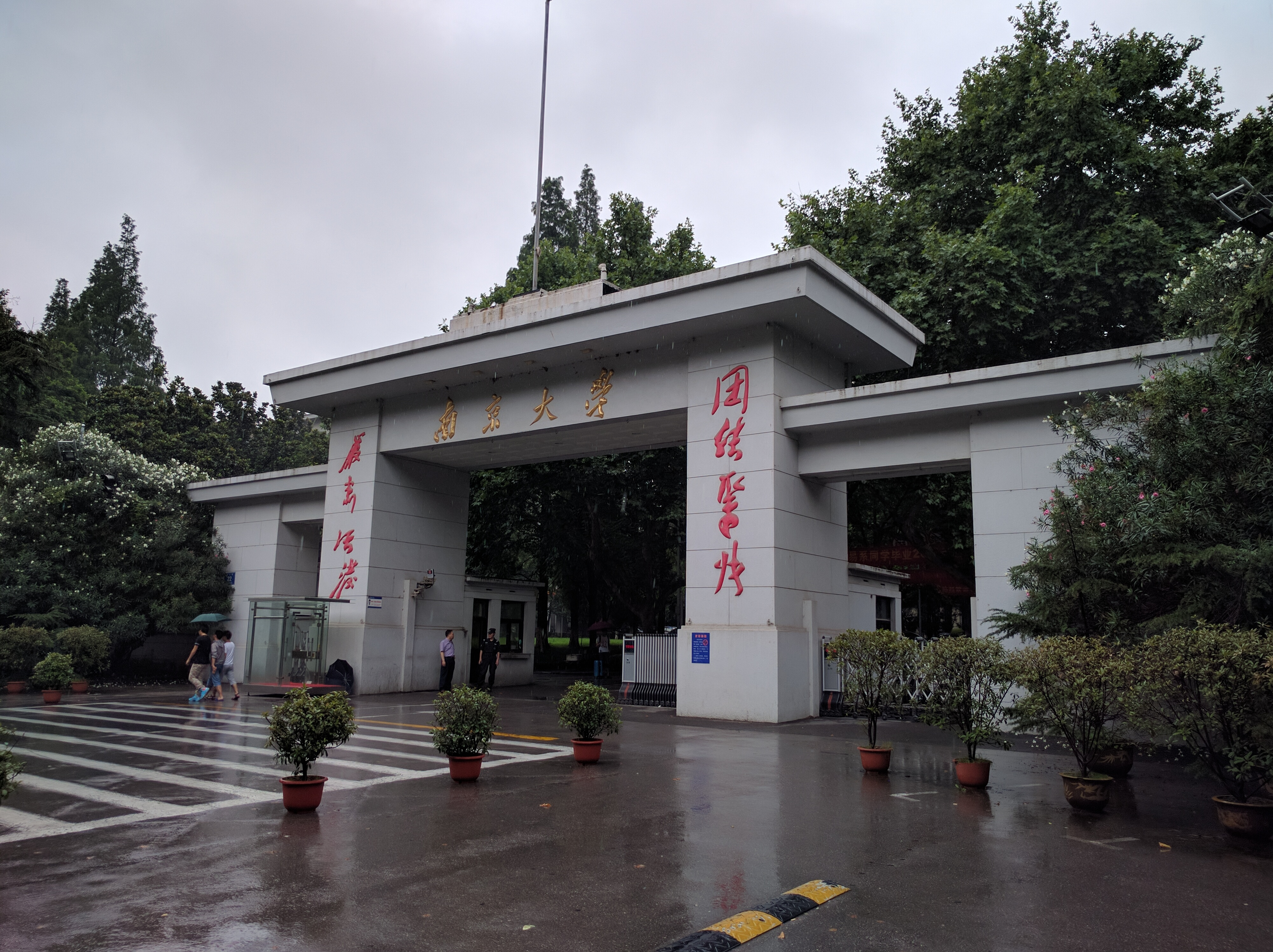 中文（中国大陆）: 南京大学校门